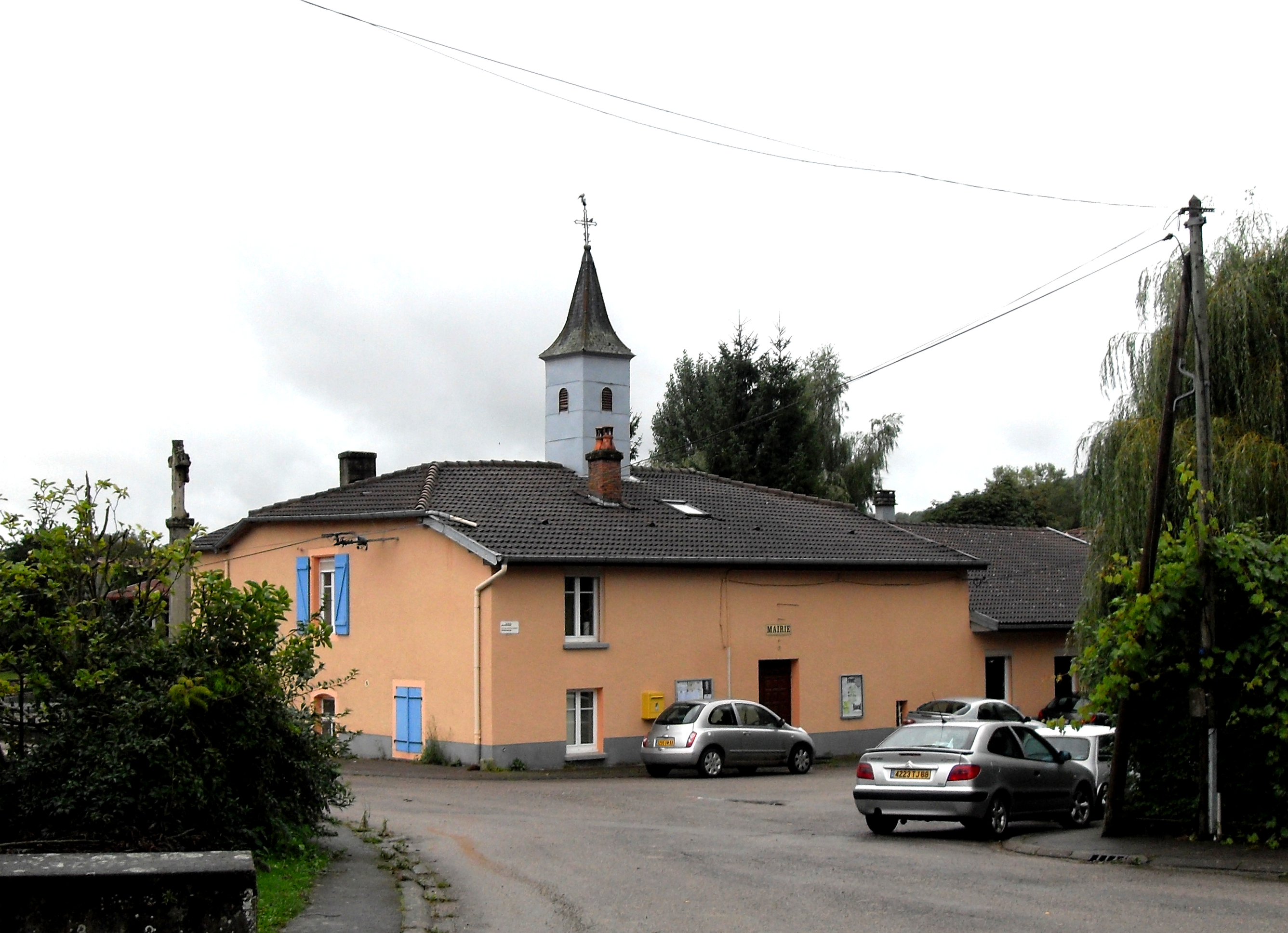 La mairie de Sans-Vallois